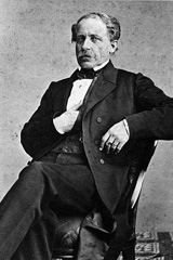 Nils Ericson